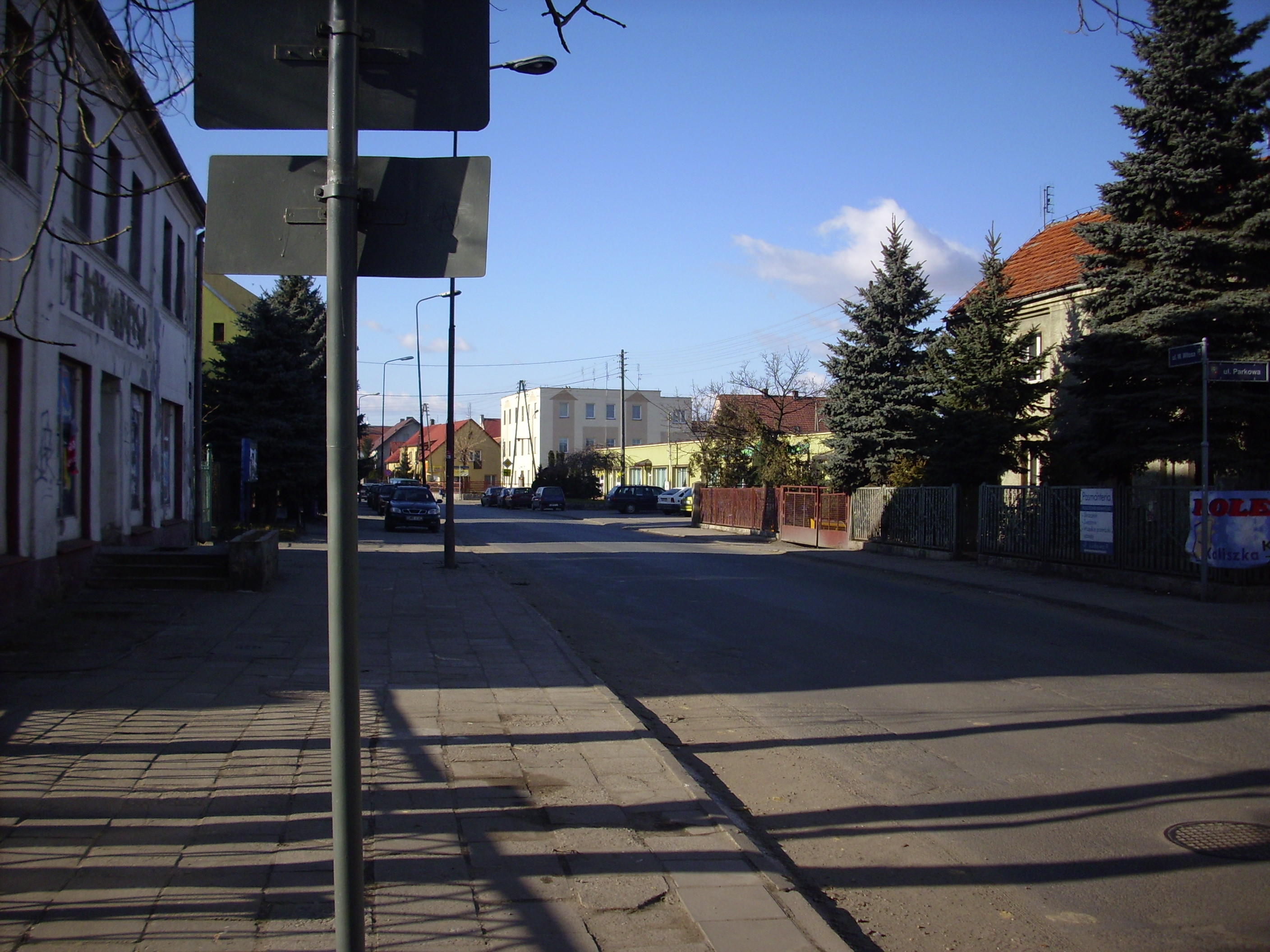 Kobierzyce.